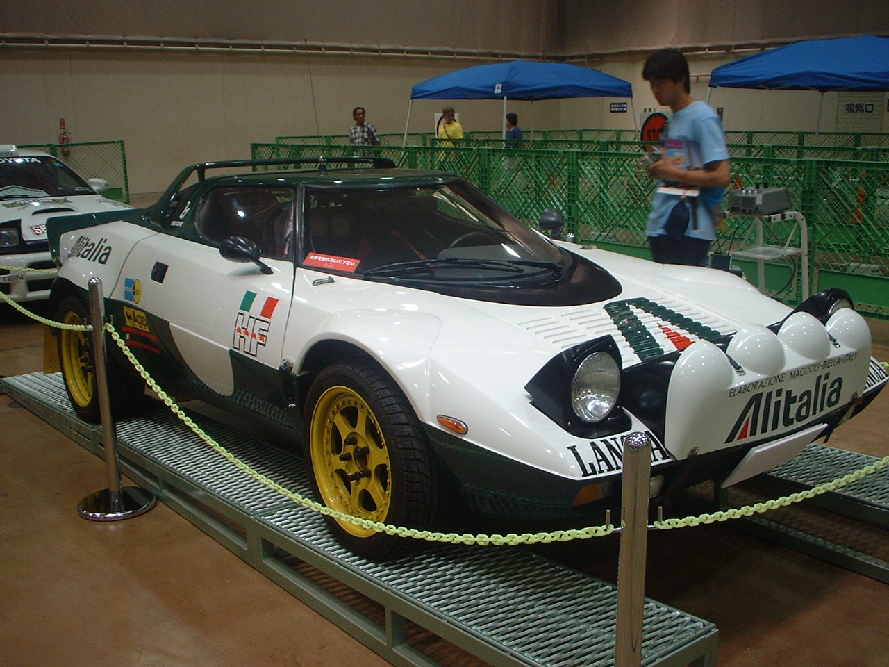 Lancia Stratos Gr.4rallycar.